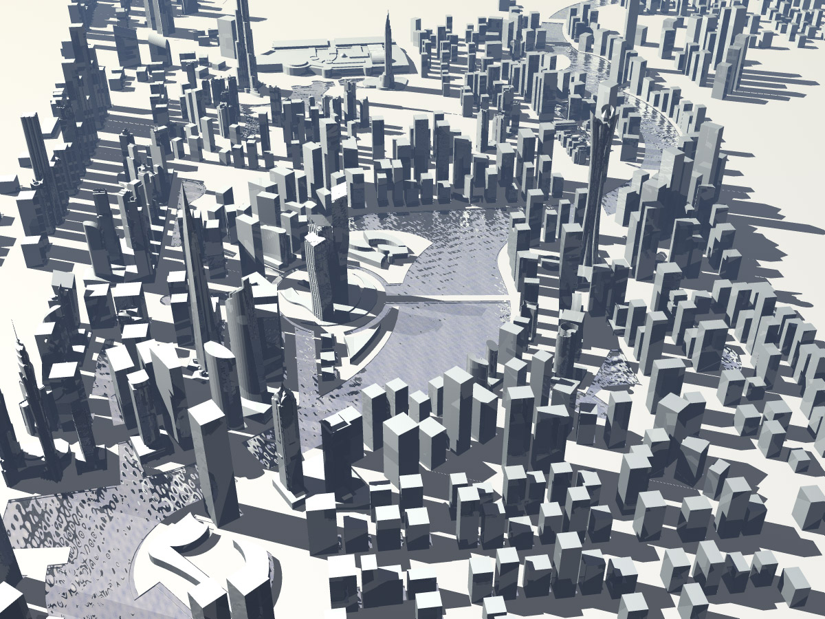 Konsep Business Bay.